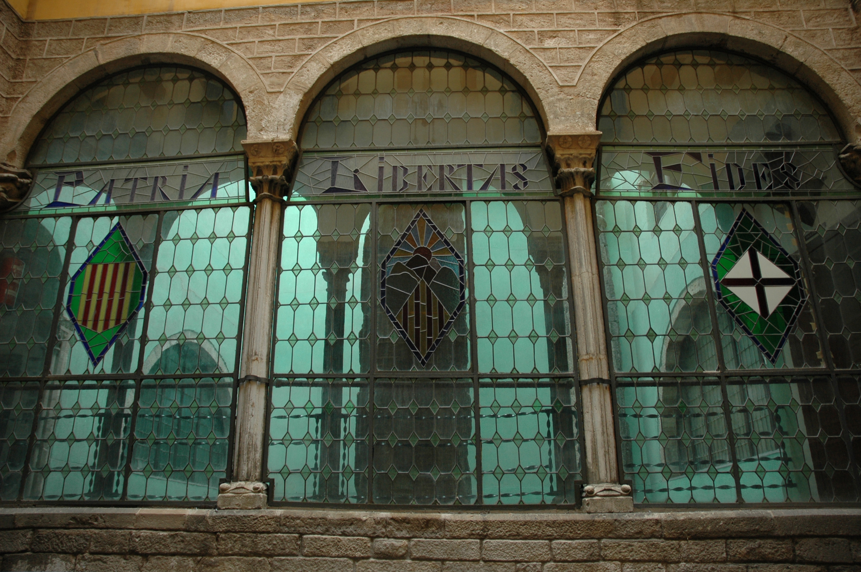 Centre Excursionista de Catalunya